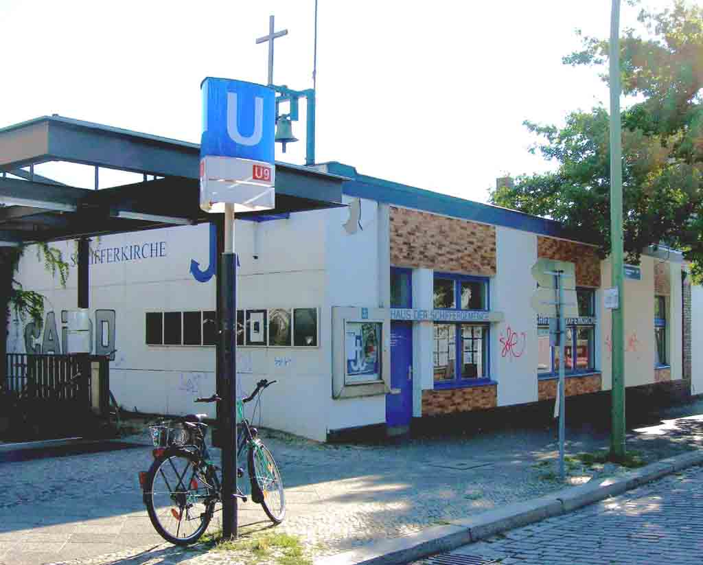 Westhafen (Berlin) Sailors' Church